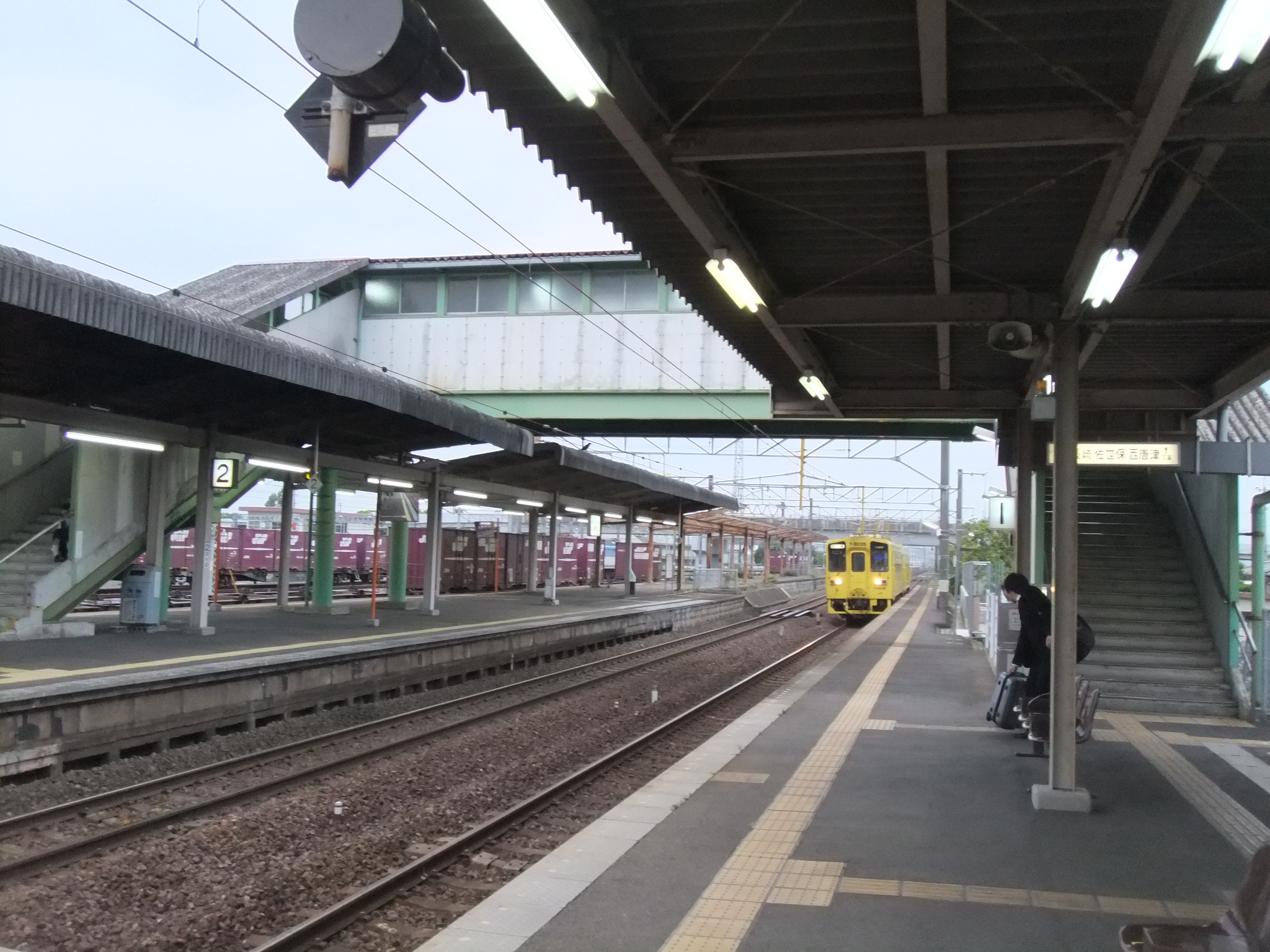 鍋島駅 駅構内